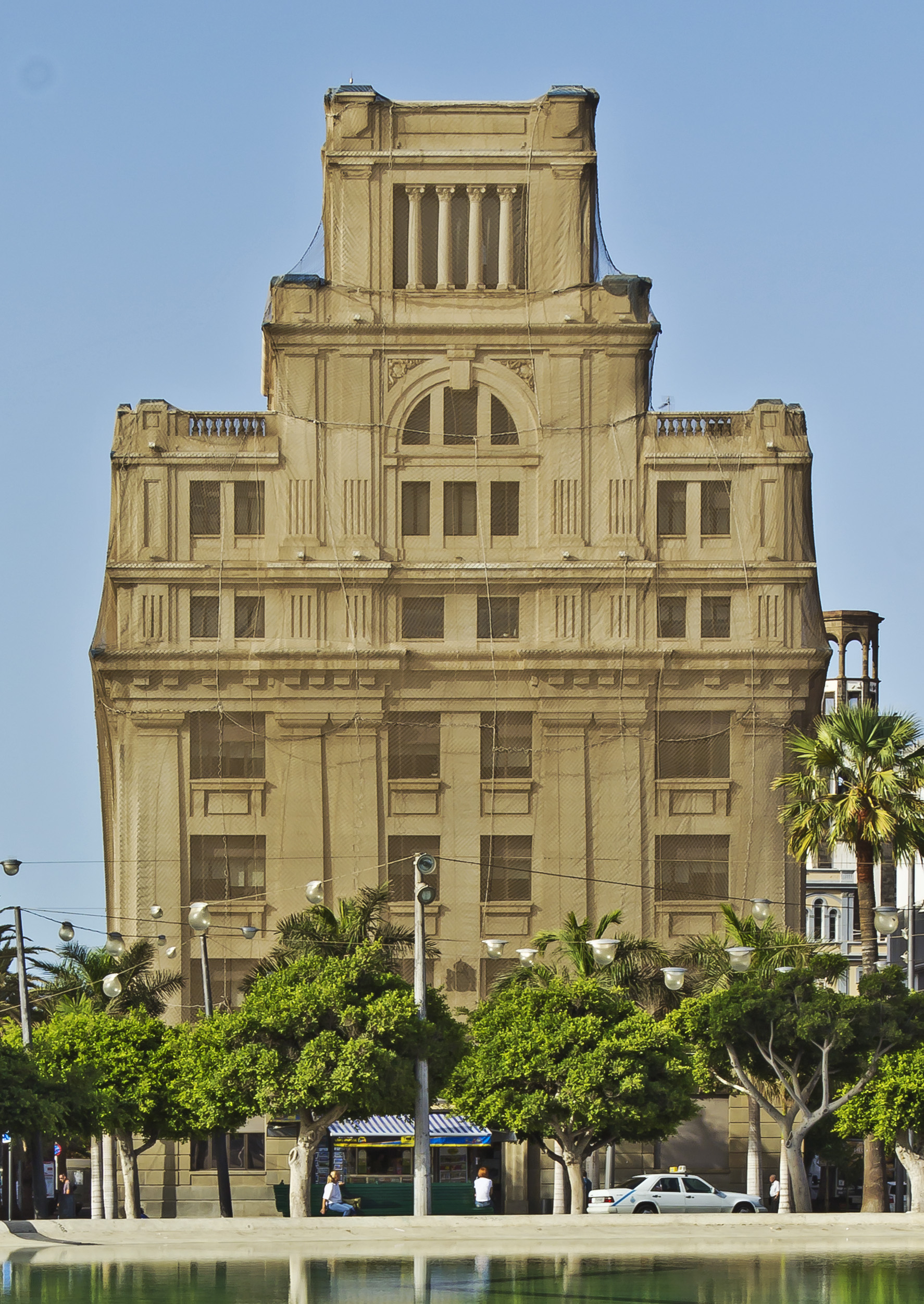 Das Gebäude des Post- und Telegrafenamtes an der Plaza de España in Santa Cruz de Tenerife wurde von dem Architekten Luis Lozano Lasilla geplant. Es wurde 1957 feriggestellt.